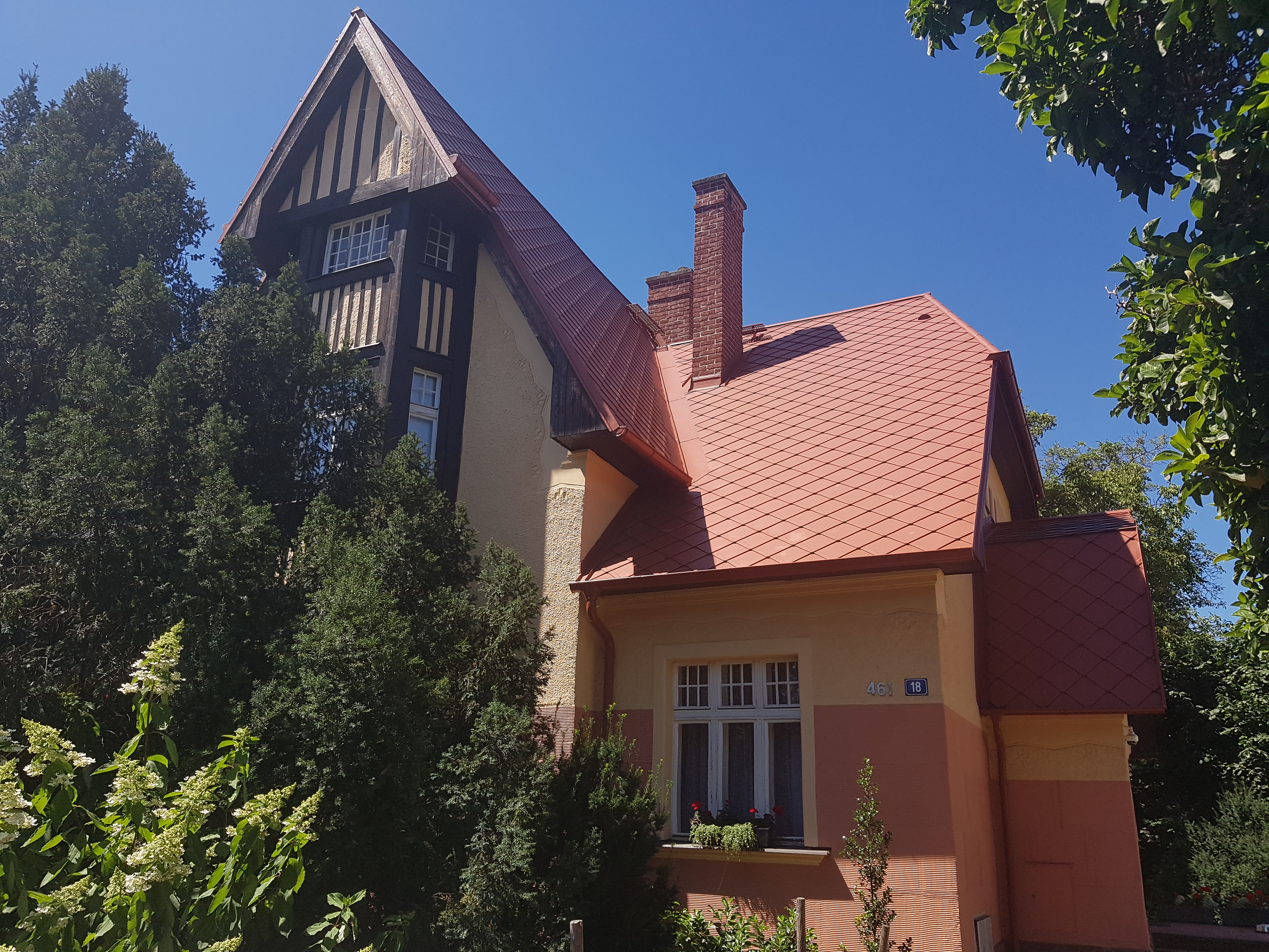 Vila Karla Jandy v Hradci Králové (2020)